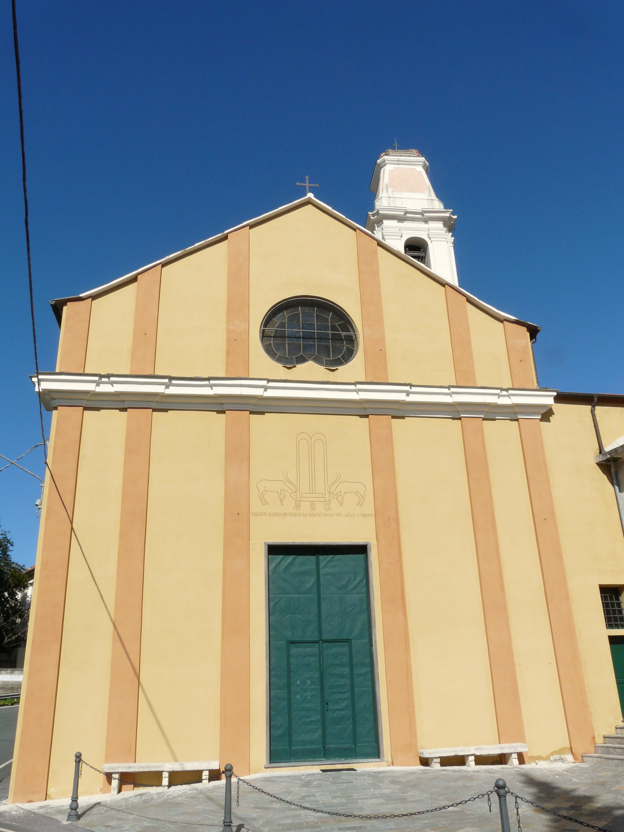 Chiesa dei Santi Salvatore e del Santissimo Sepolcro, Vezzi Portio, Liguria, Italia